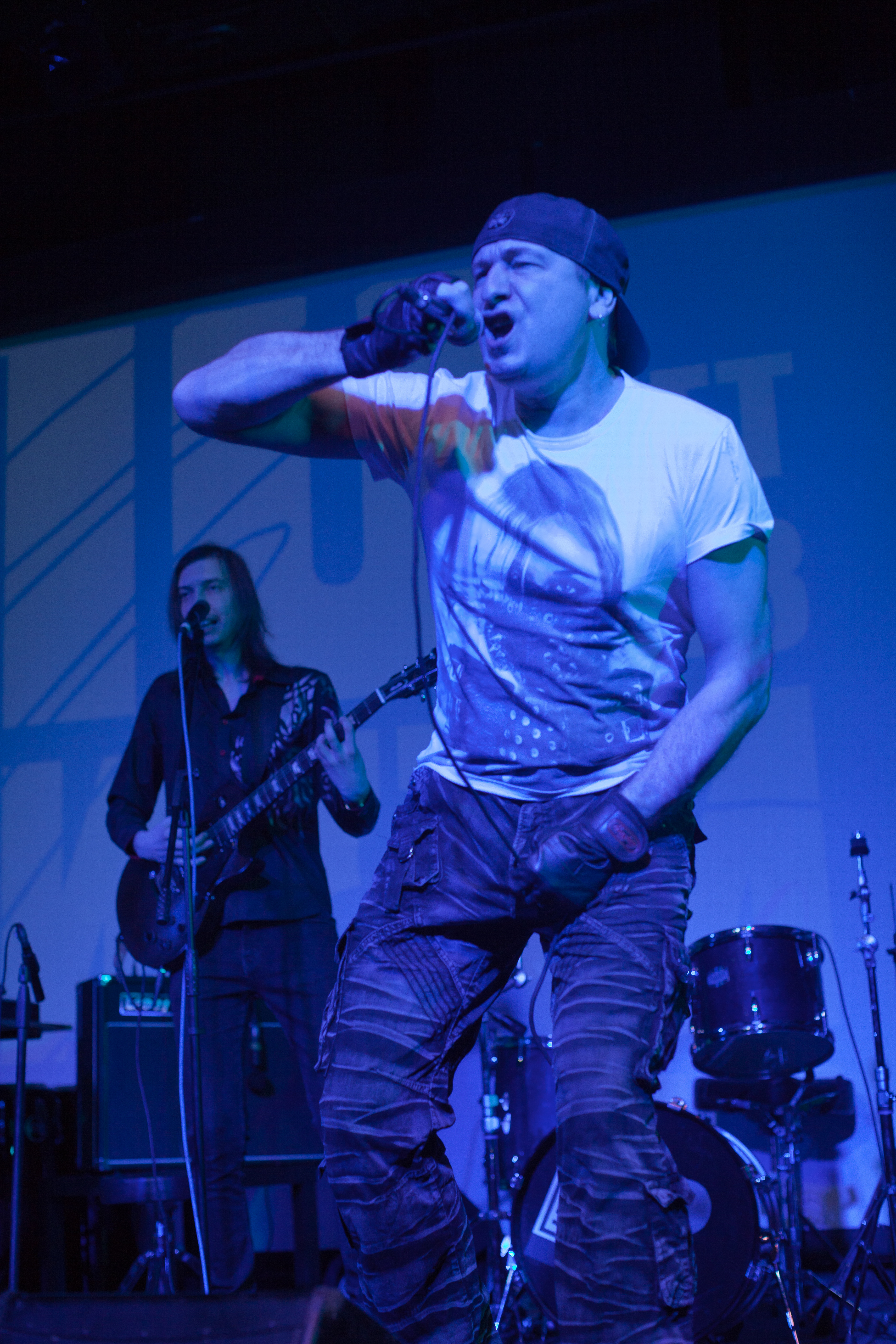 Вис Виталис на концерте памяти Ильи Кормильцева